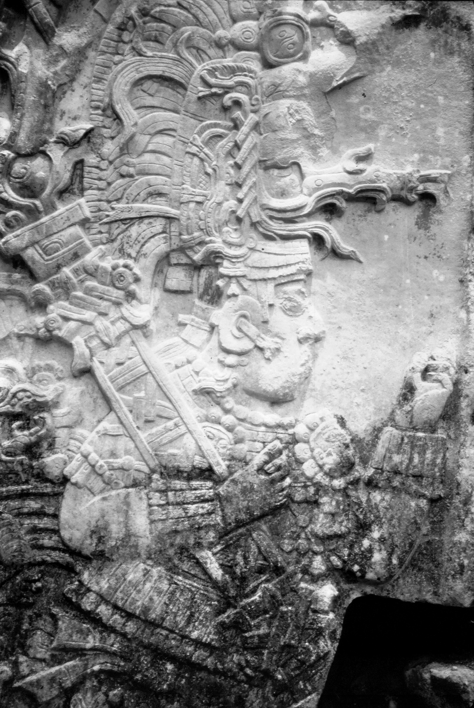 Panel 10 (detail) Dos Pilas